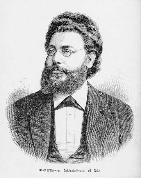 Adolph L'Arronge / Adolf Aaronsohn (* 8. März 1838; † 15. Mai 1908), deutscher Bühnenautor